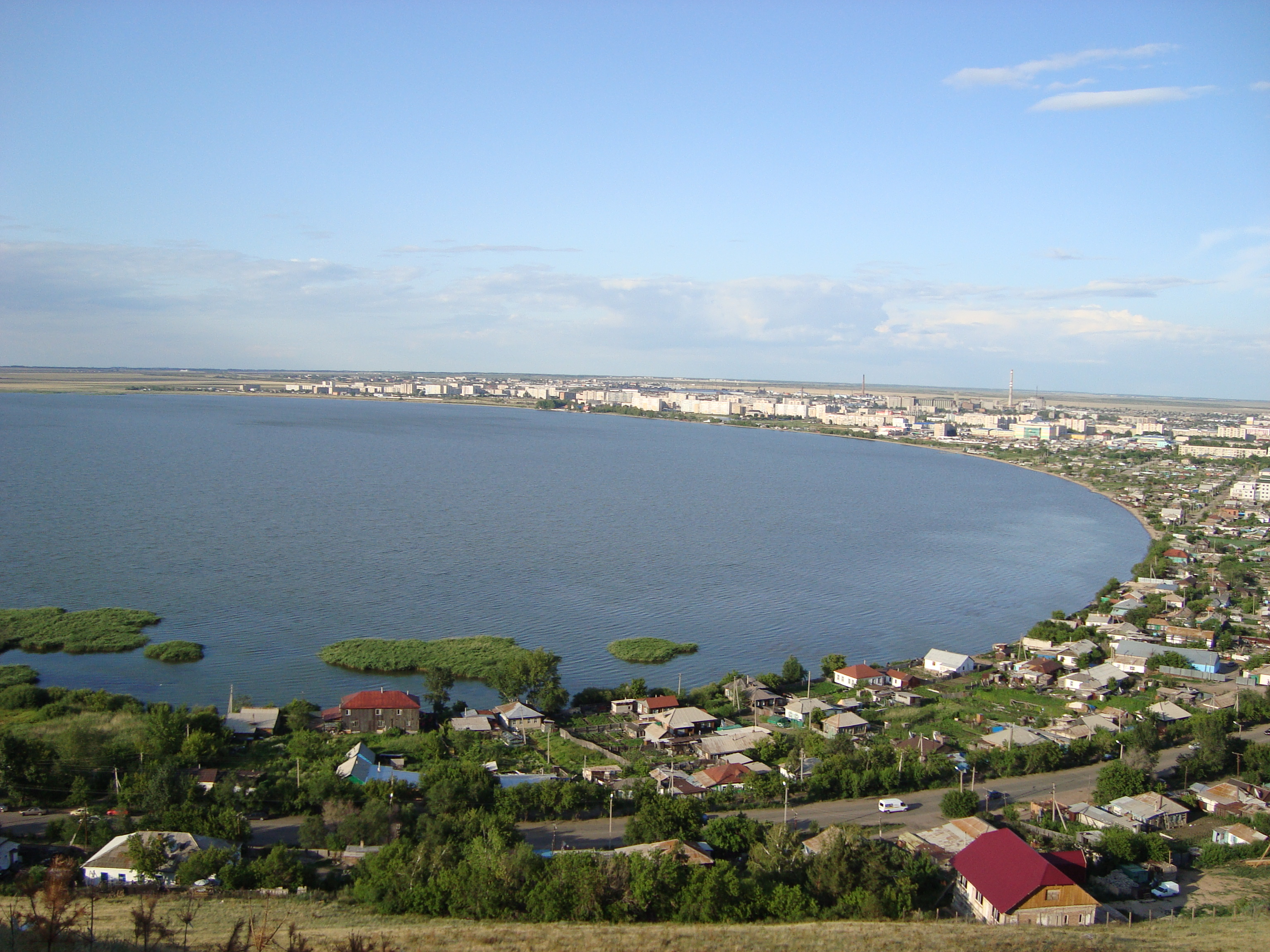 озеро